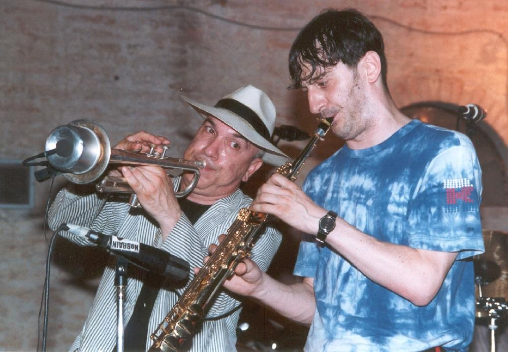 Donà e Bearzatti in concerto